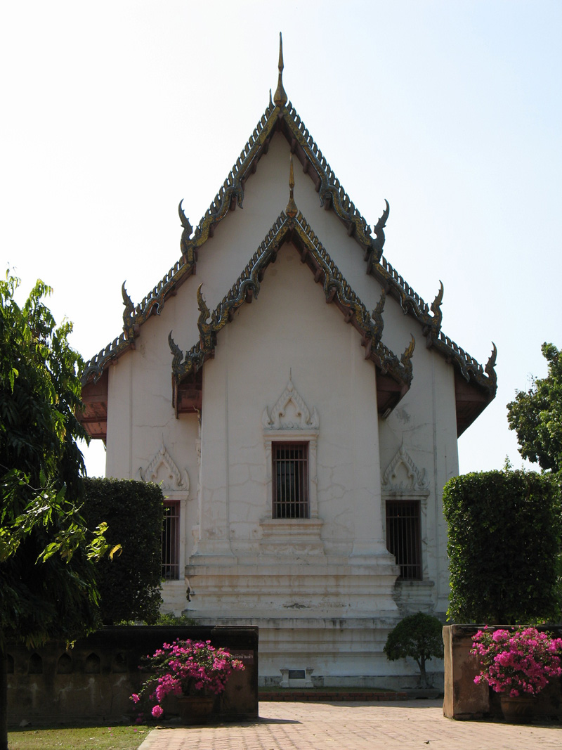 Chantara Phisan Hall, King Narai's Palace, Lopburi Province.